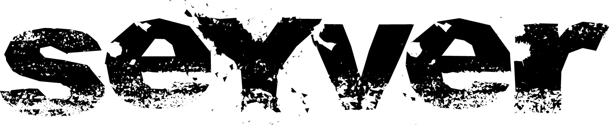 Logo de la Banda